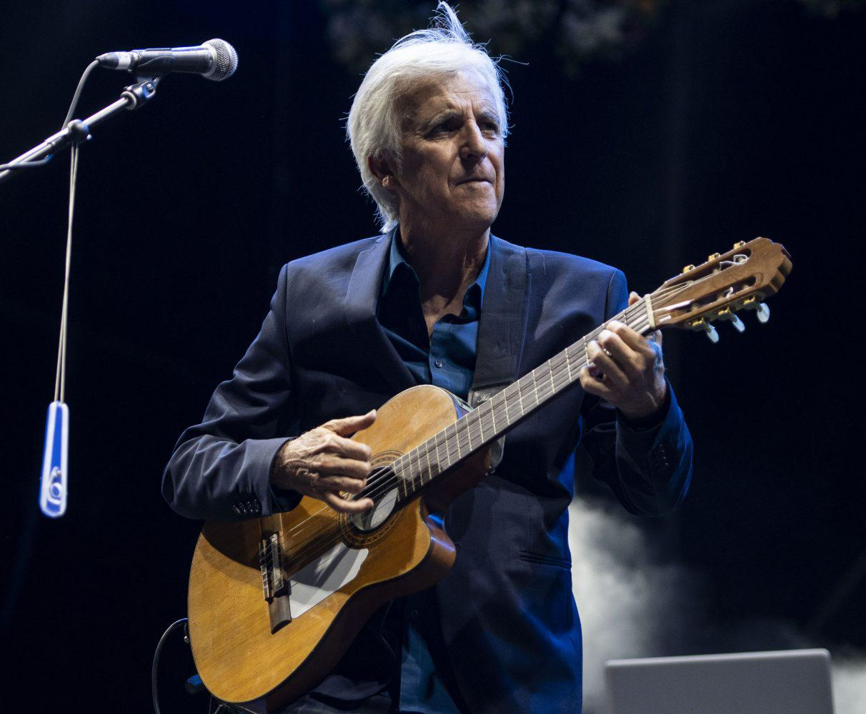 Los sonidos más rumberos se apoderaron ayer de la noche madrileña. Miles de personas abarrotaron los escenarios, a un lado y a otro del río.